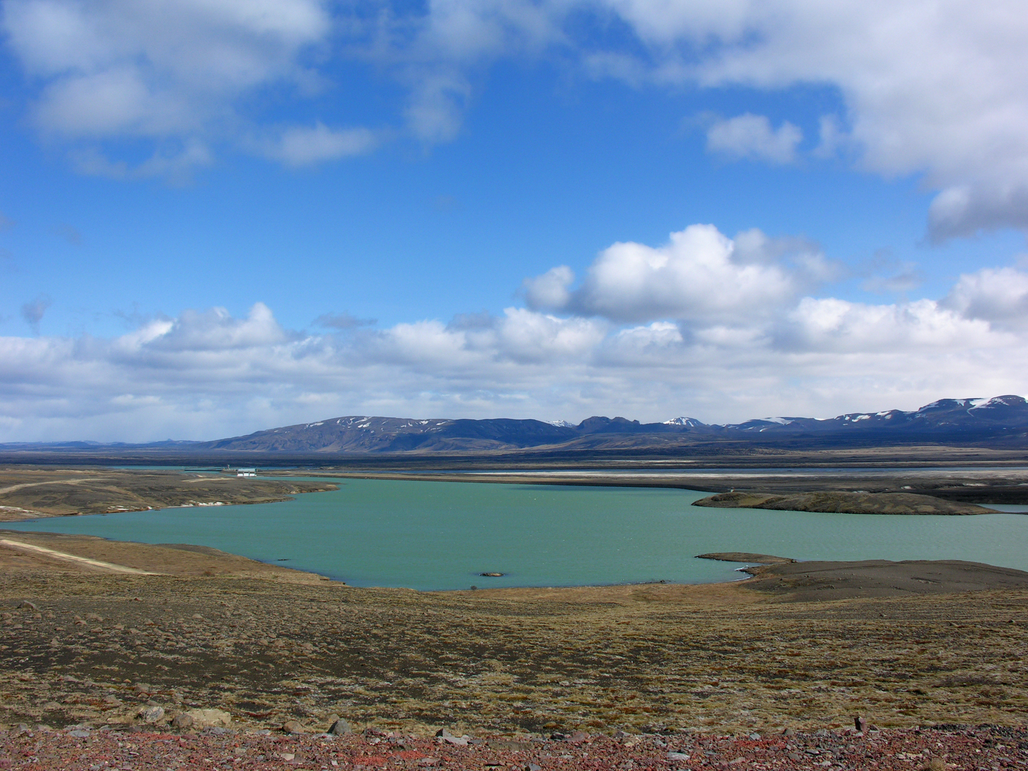 Iceland, Þjórsá